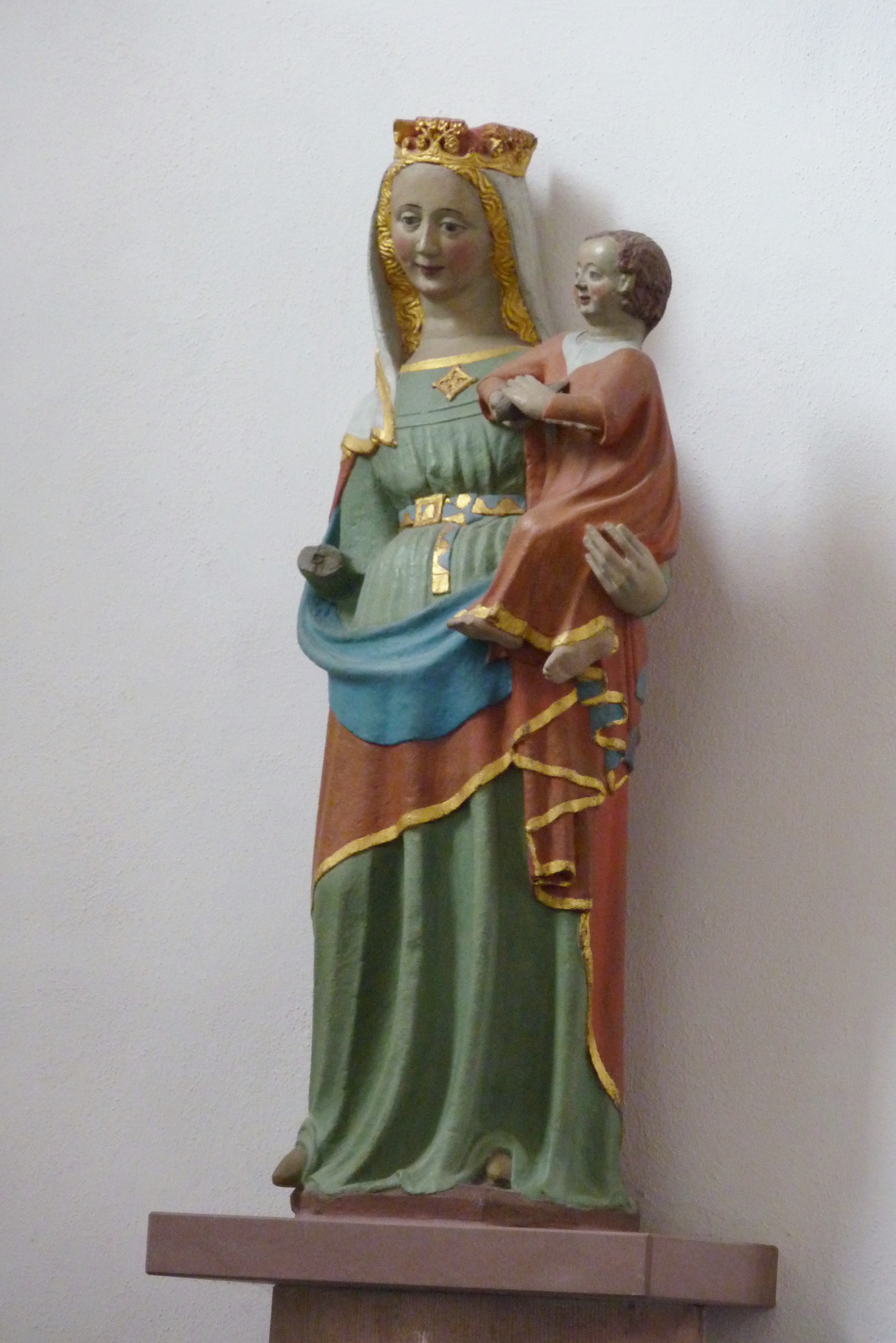 Evangelische Stadtkirche in Lauterbach (Hessen), Marktplatz 10, Madonna mit Kind aus Stein, Anfang 14. Jh.